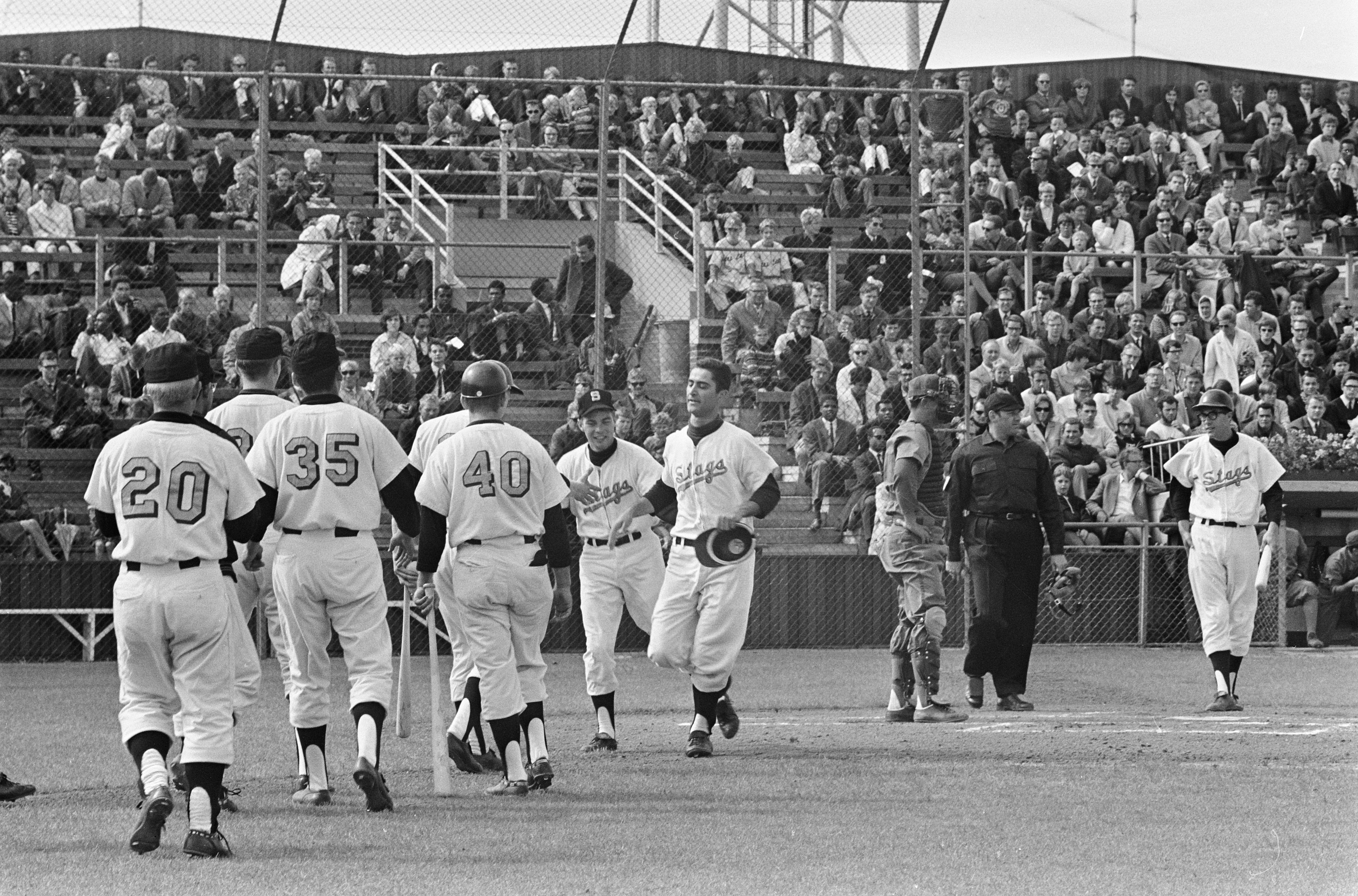 Collectie / Archief : Fotocollectie Anefo Reportage / Serie : [ onbekend ] Beschrijving : Haarlemse Honkbalweek, Nederlandse Antillen tegen California Stags , Chuck Iverson heeft tweede homerun geslagen, komt binnen Datum : 10 augustus 1966 Locatie : Haarlem Trefwoorden : honkbal Fotograaf : Kroon, Ron / Anefo Auteursrechthebbende : Nationaal Archief Materiaalsoort : Negatief (zwart/wit) Nummer archiefinventaris : bekijk toegang 2.24.01.05 Bestanddeelnummer : 919-4406